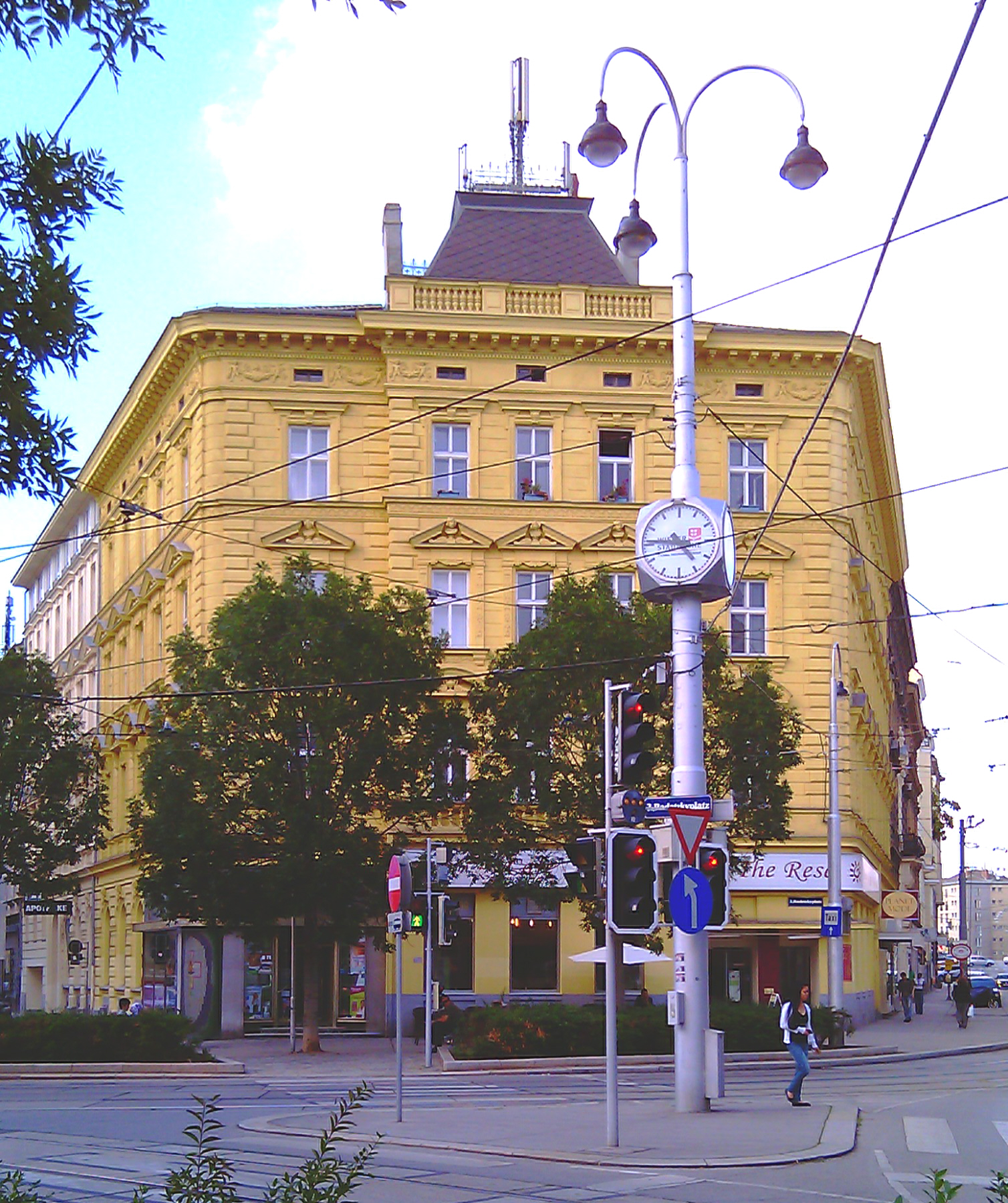 Haus Radetzkyplatz 4 in Wien-Landstraße